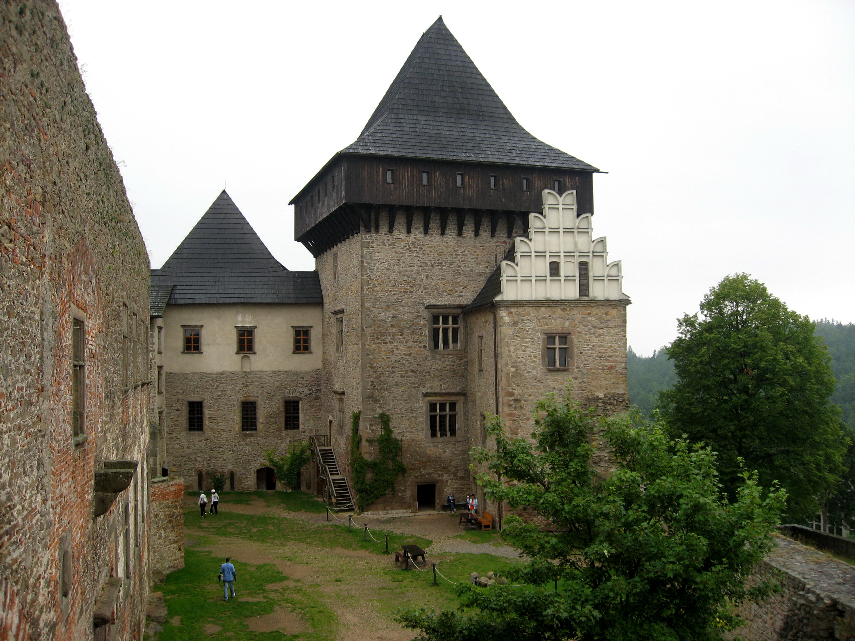 Zřícenina hradu Lipnice nad Sázavou